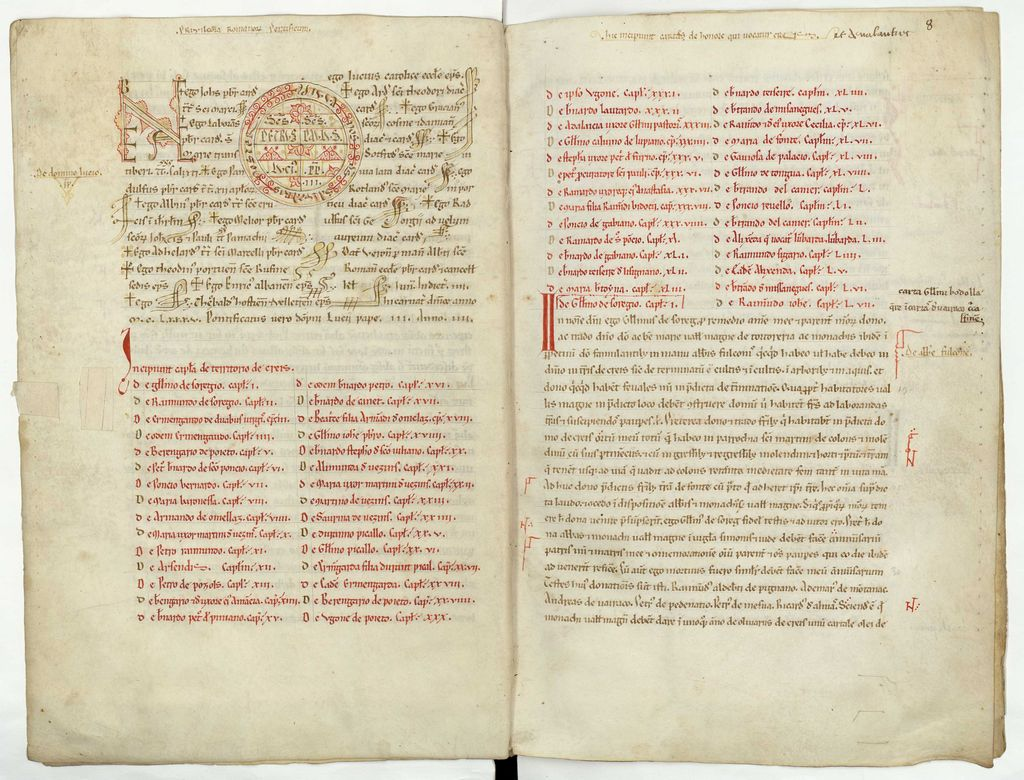 Cartulaire de l'abbaye de Valmagne (Hérault) : 1e tome (1138-1195)